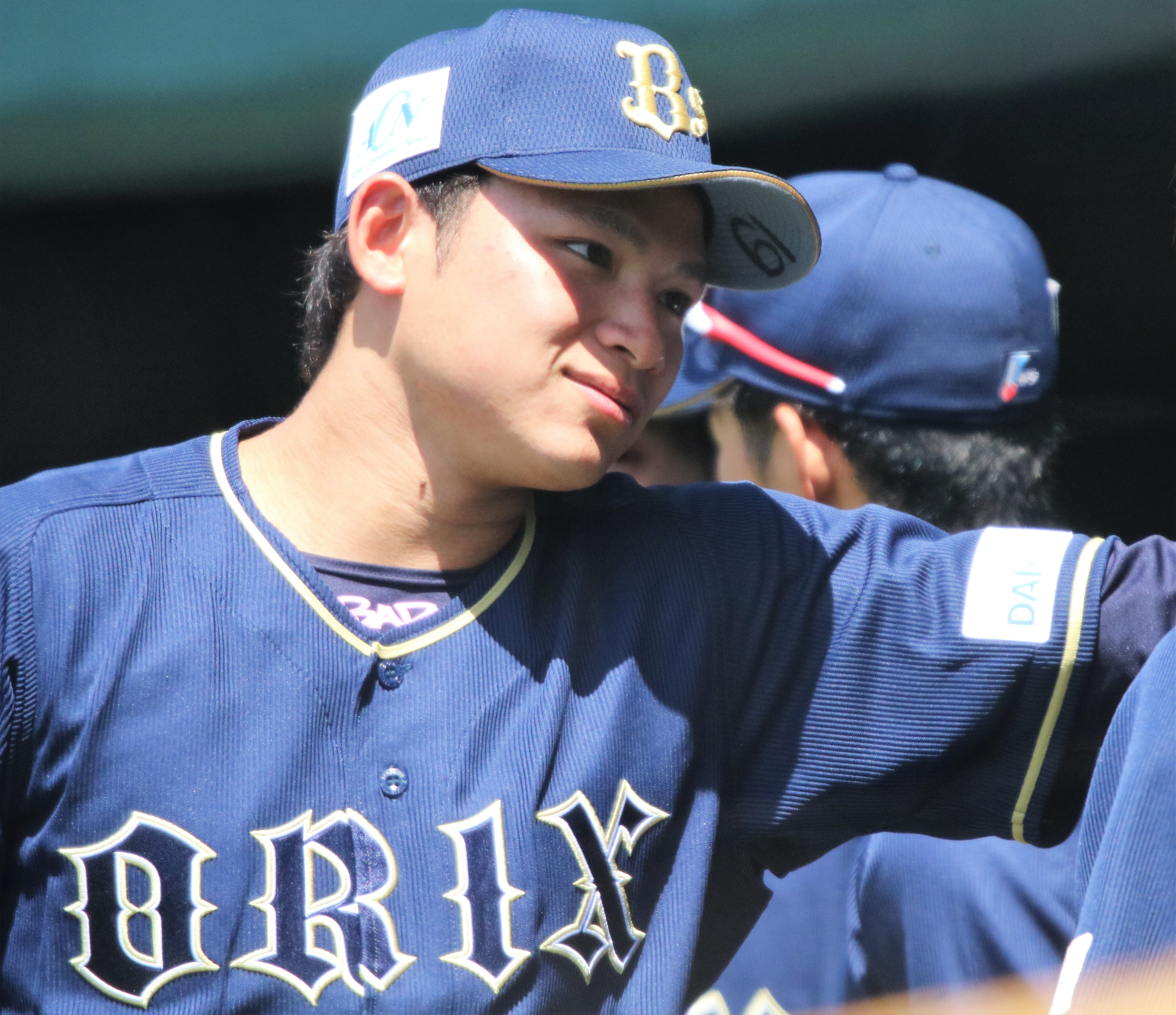 2018/4/20 タマホームスタジアム筑後